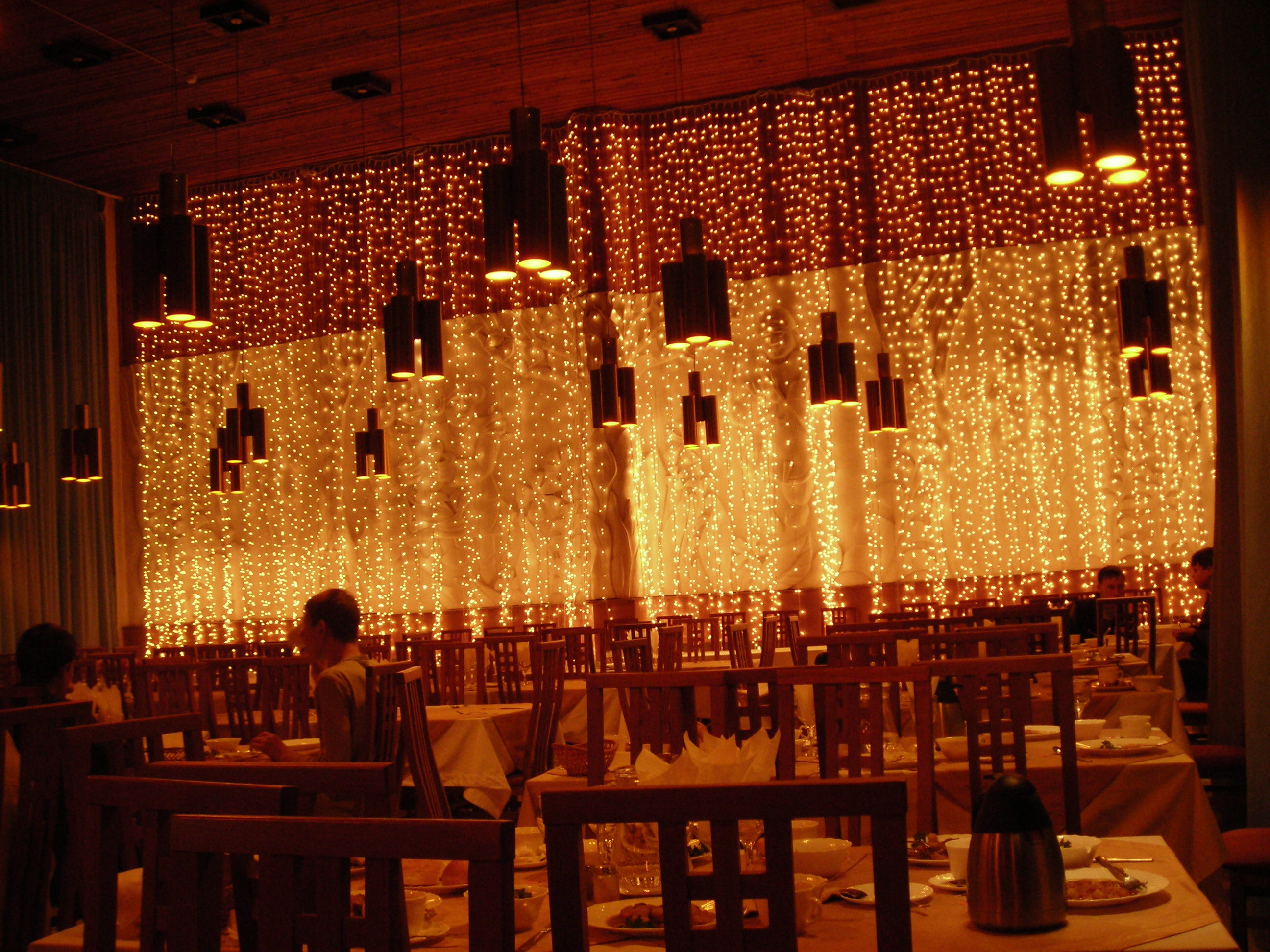 A cafe